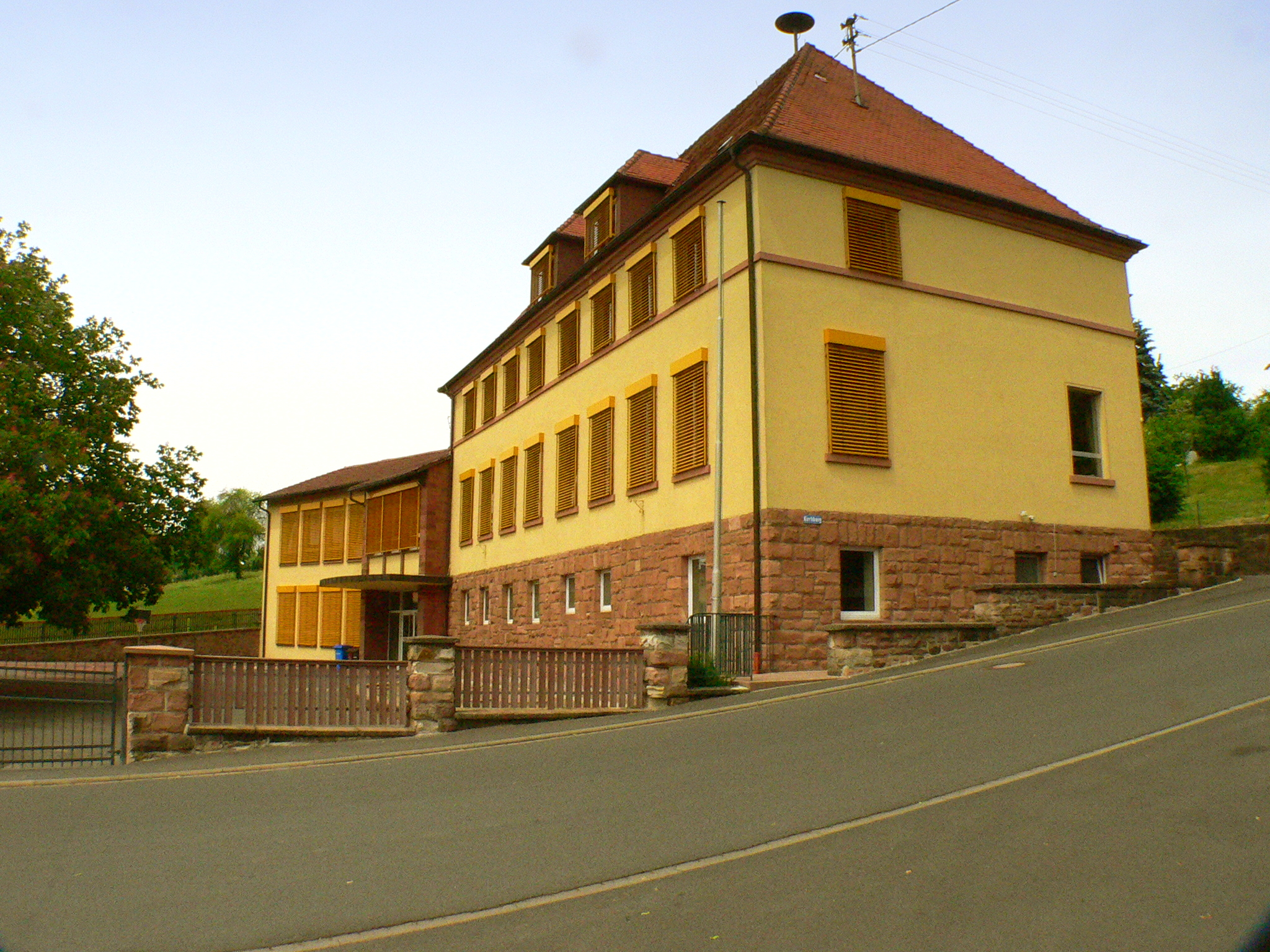 Grundschule in Sommerkahl bei Aschaffenburg, Deutschland